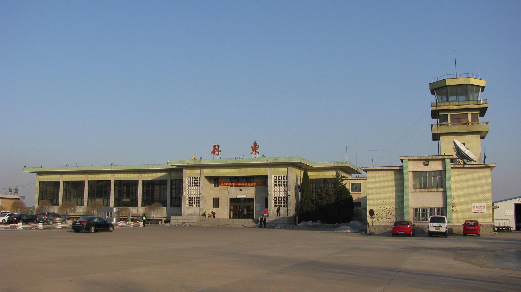 Dan Dong Airport 丹东机场